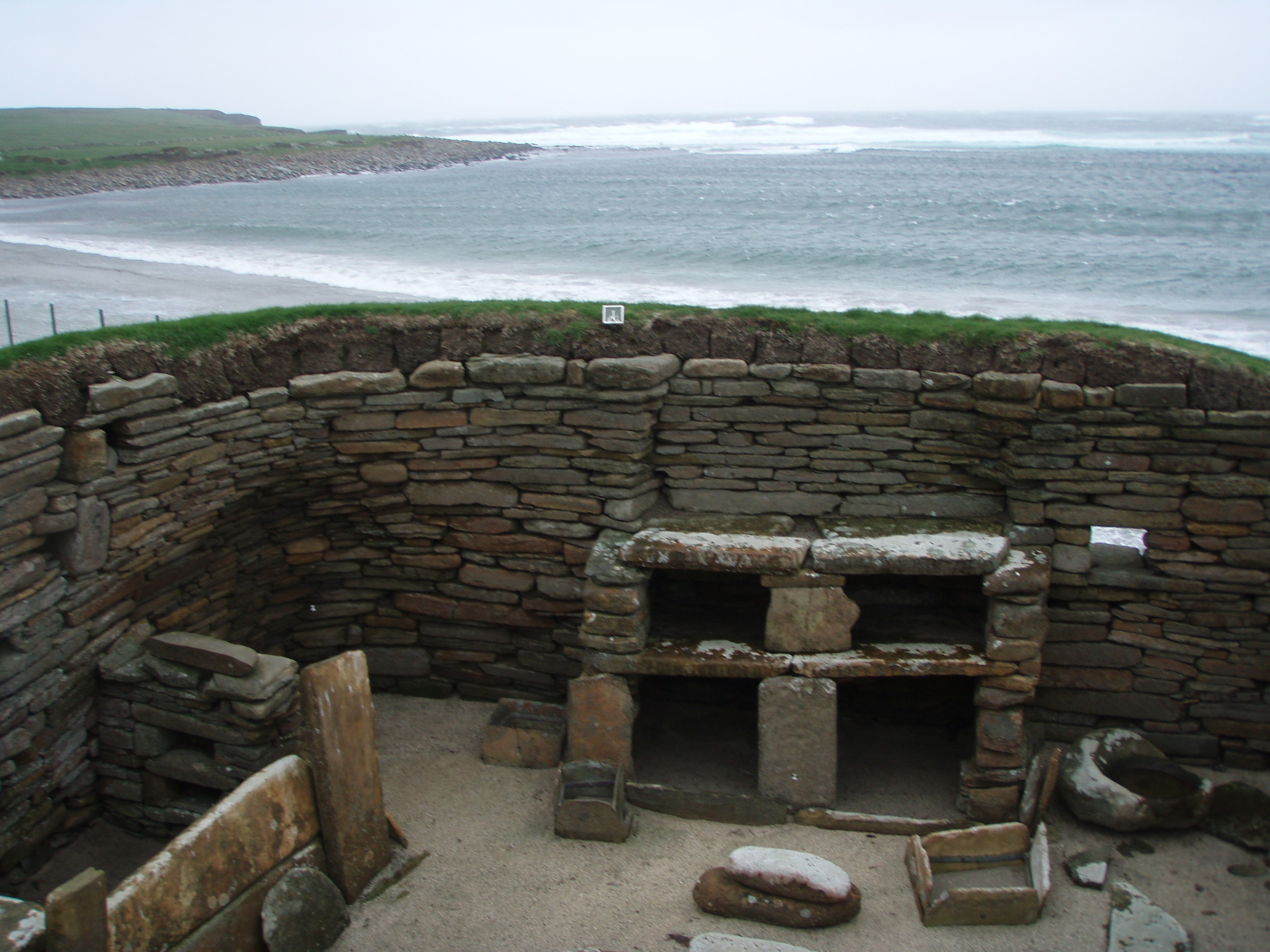 Scara Brae Orkney